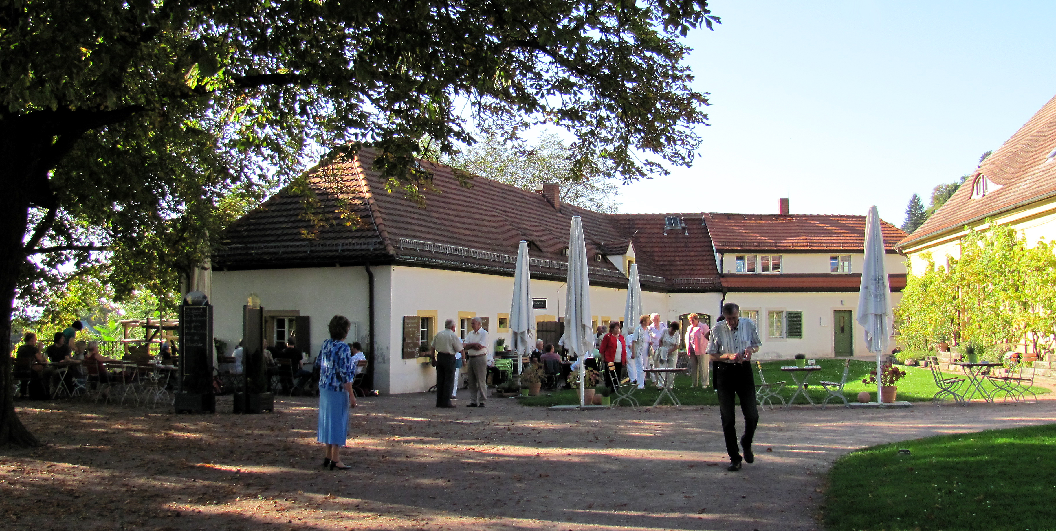 Radebeul, Hoflößnitz, Gaststätte